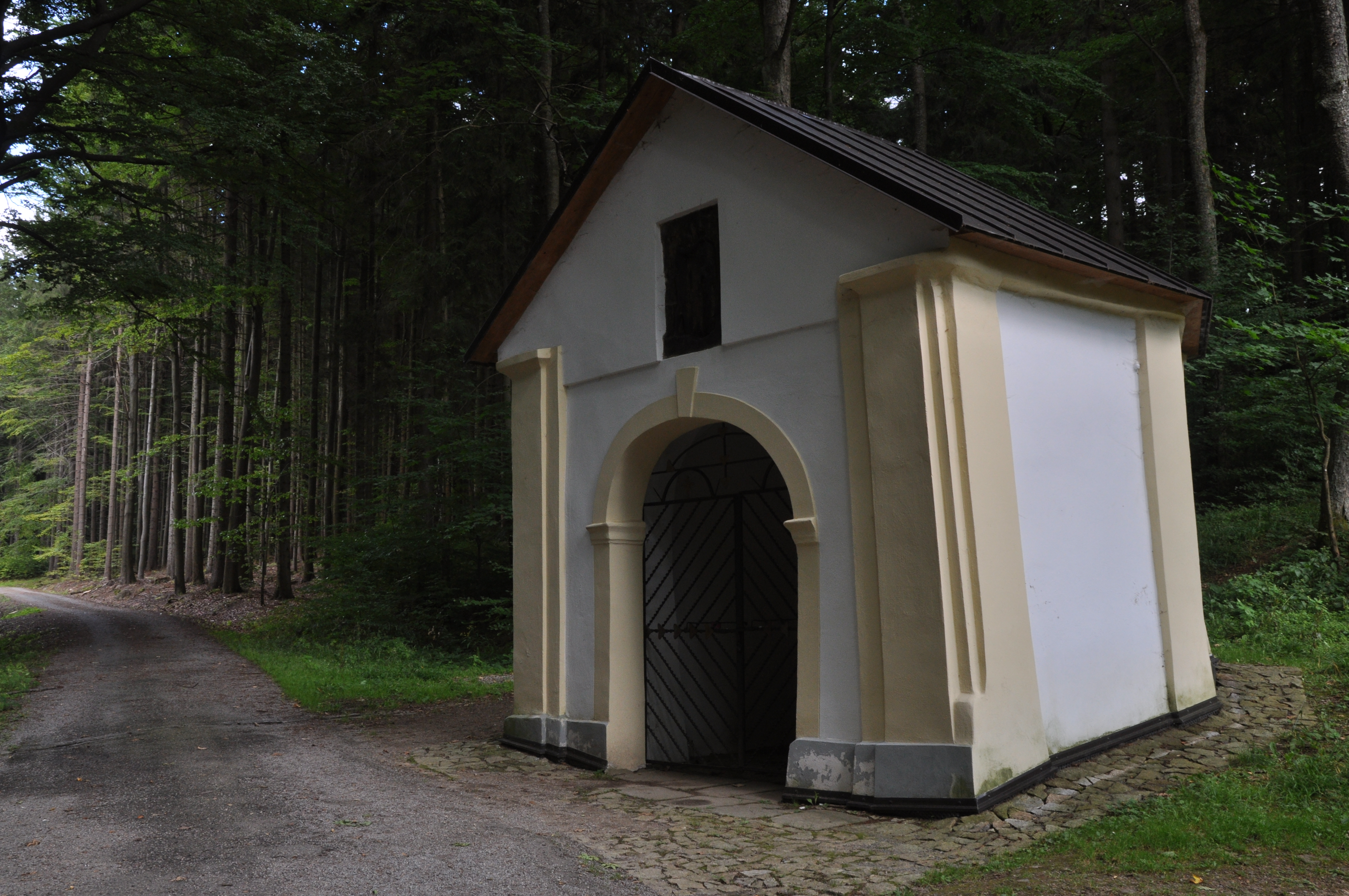 Kaple svatého Jana Křtitele . Křemešník. Nový Rychnov. Okres Pelhřimov. Kraj Vysočina. Czech Republic.